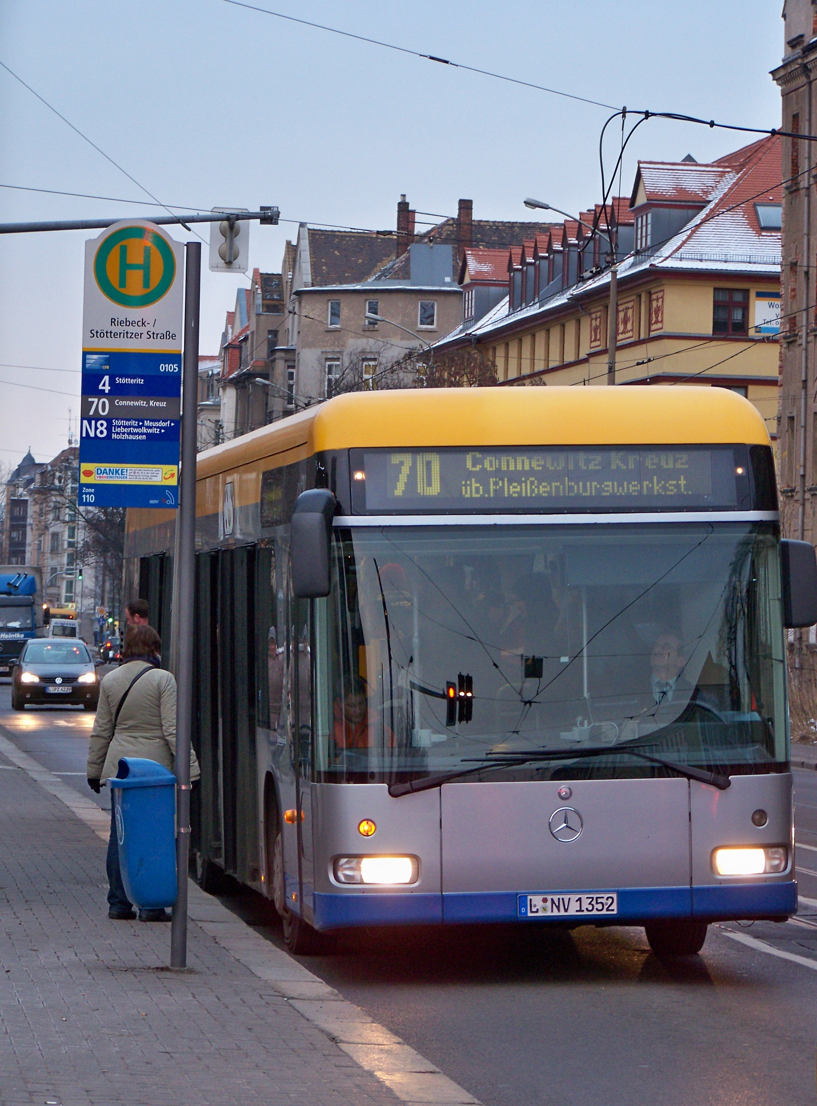 Ein MB Citaro O530 G (Silberpfeil) auf der Linie 70 der Leipziger Verkehrsbetriebe/LeoBus an der Haltestelle Riebeck-/Stötteritzer Straße in Fahrtrichtung Connewitz, Kreuz